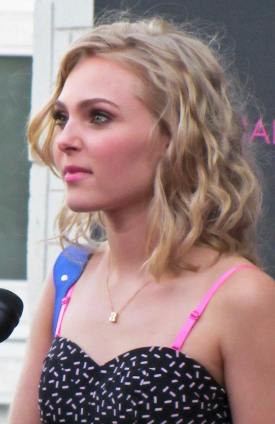 Anna-Sophia Robb